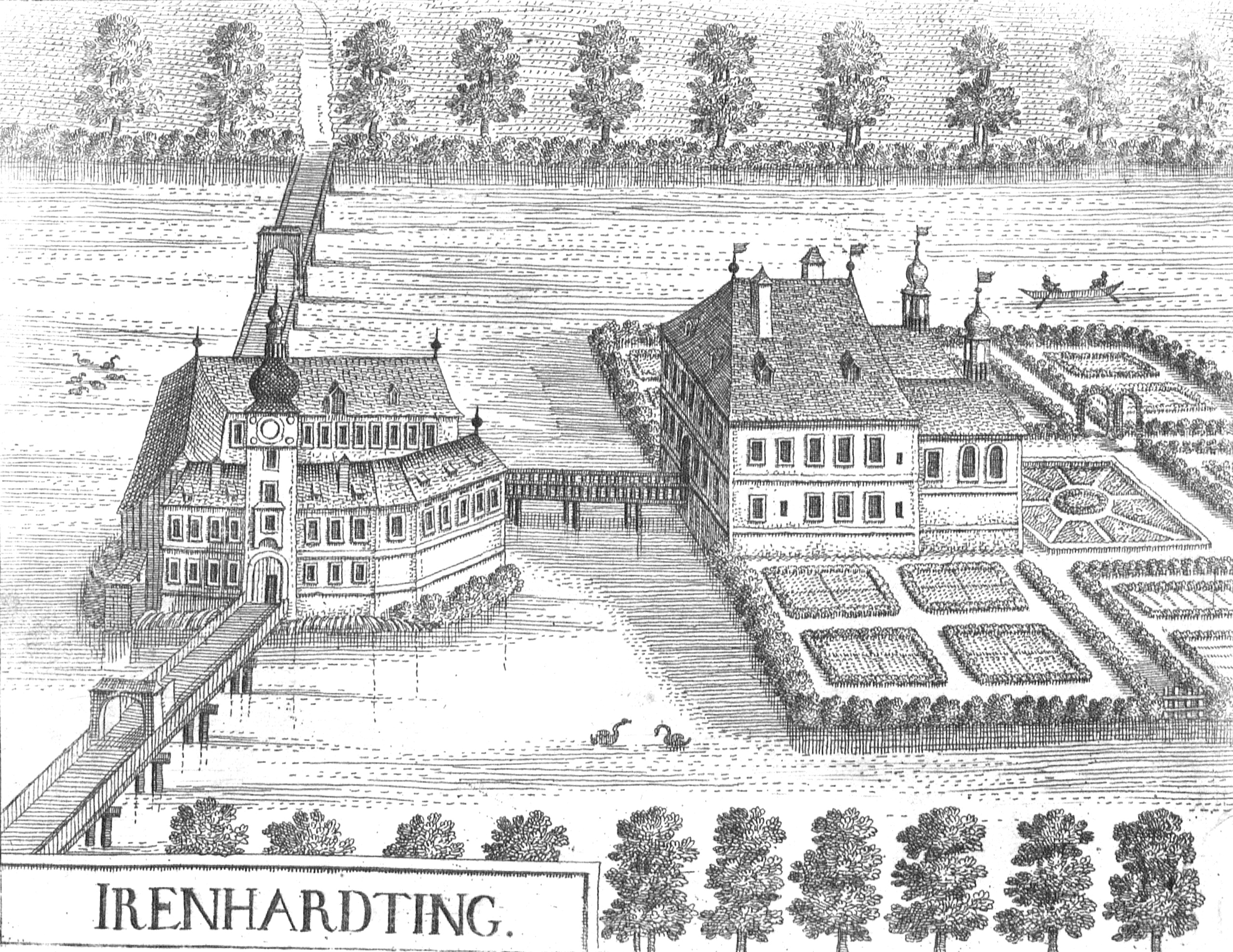 Schloss Iranharting nach Vischer von 1674